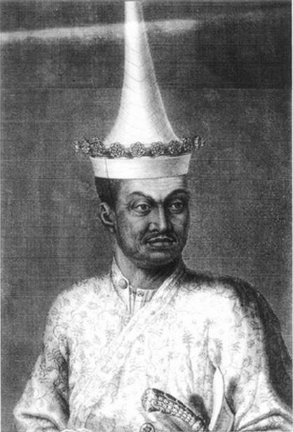 Thai ambassador to France Kosa Pan (1686)